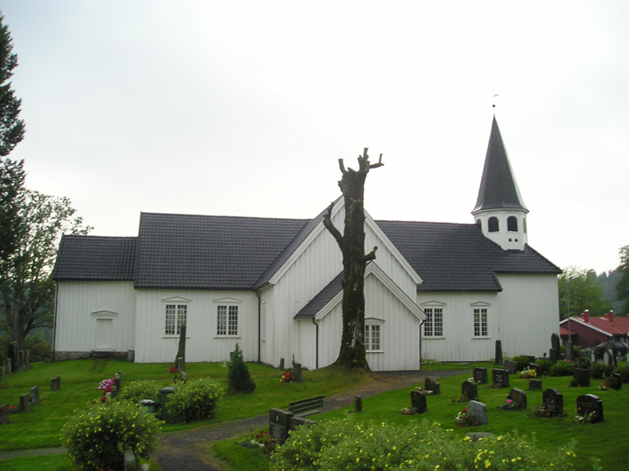 Drangedal kirke, Drangedal kommune, Telemark fylke, Norway. GFDL